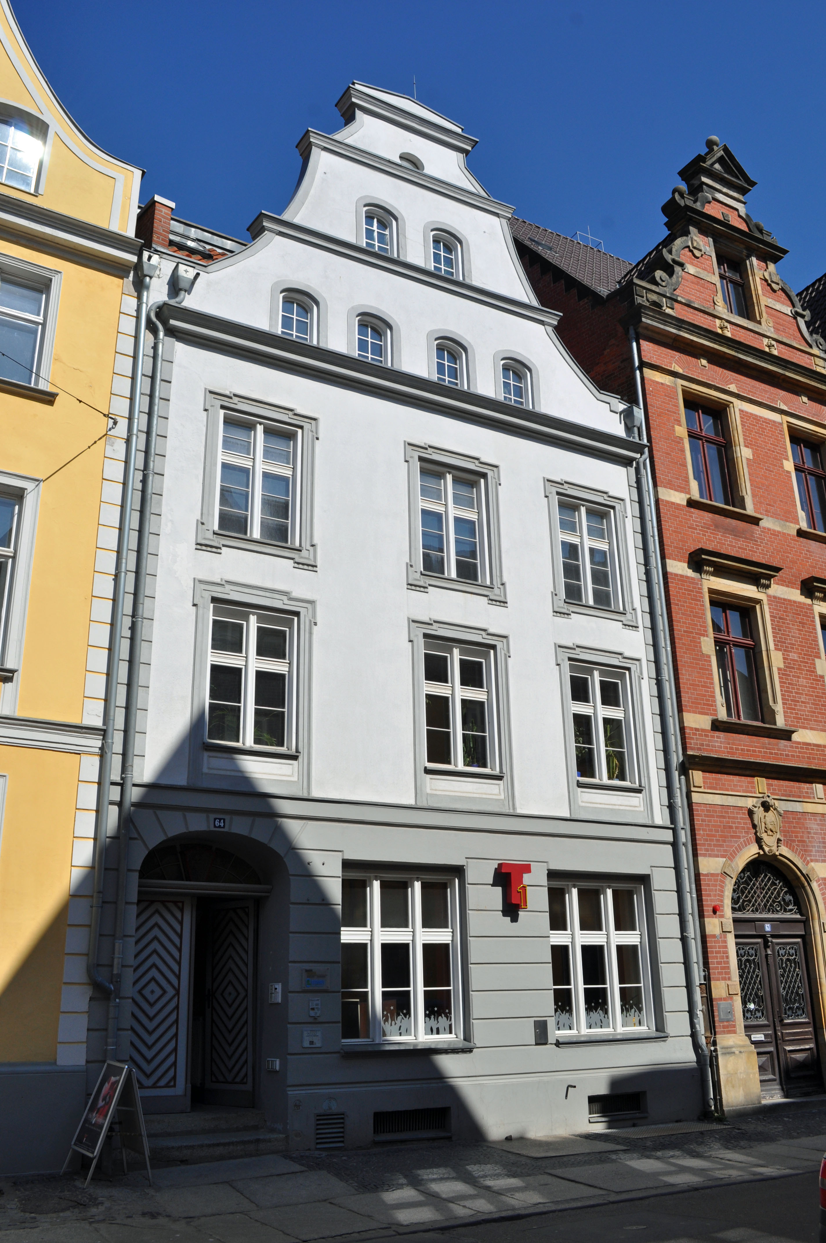 Gebäude bzw. Gebäudedetail in Stralsund. Straße und Hausnummer siehe Dateiname.